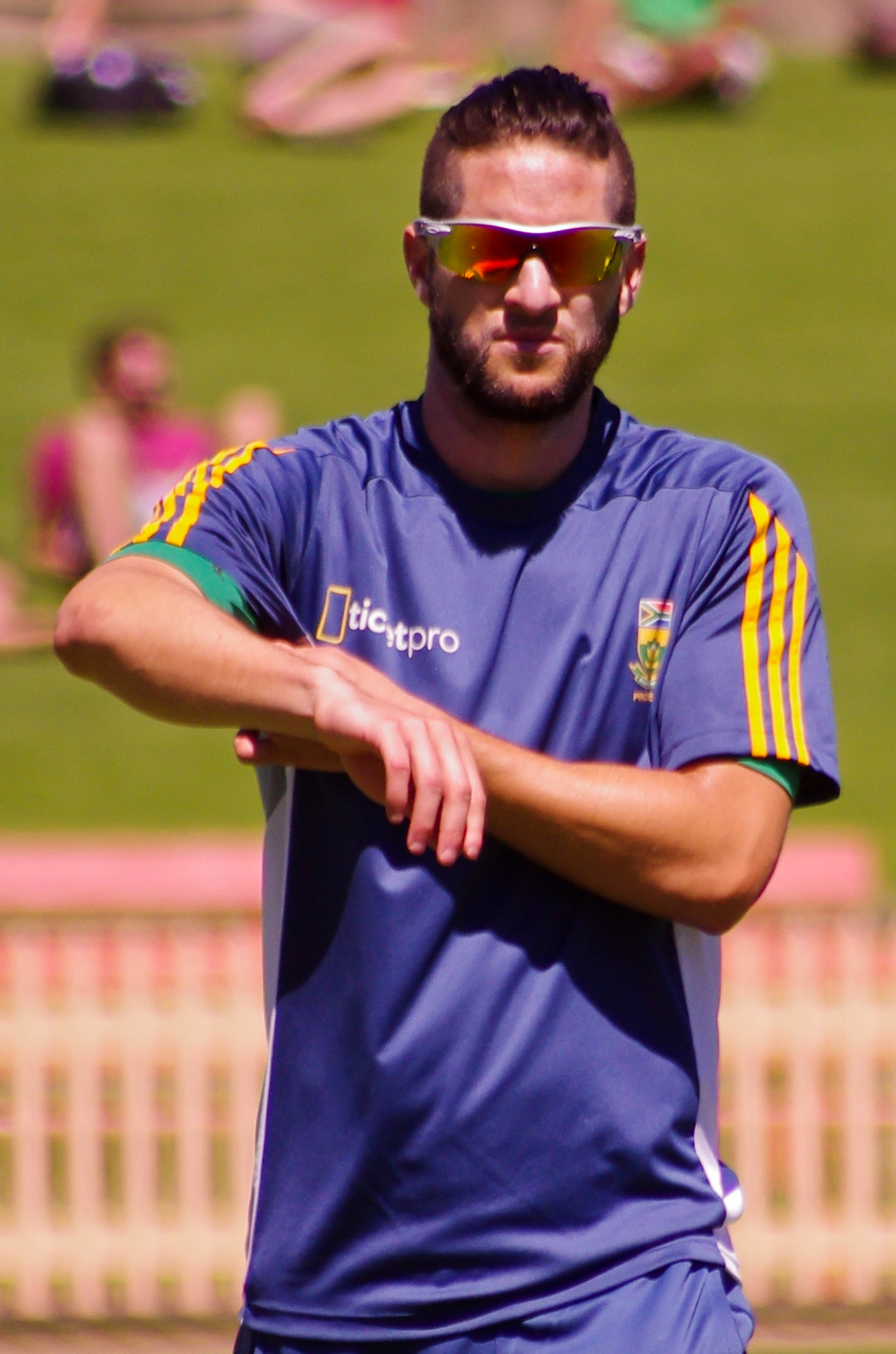 WAYNE PARNELL